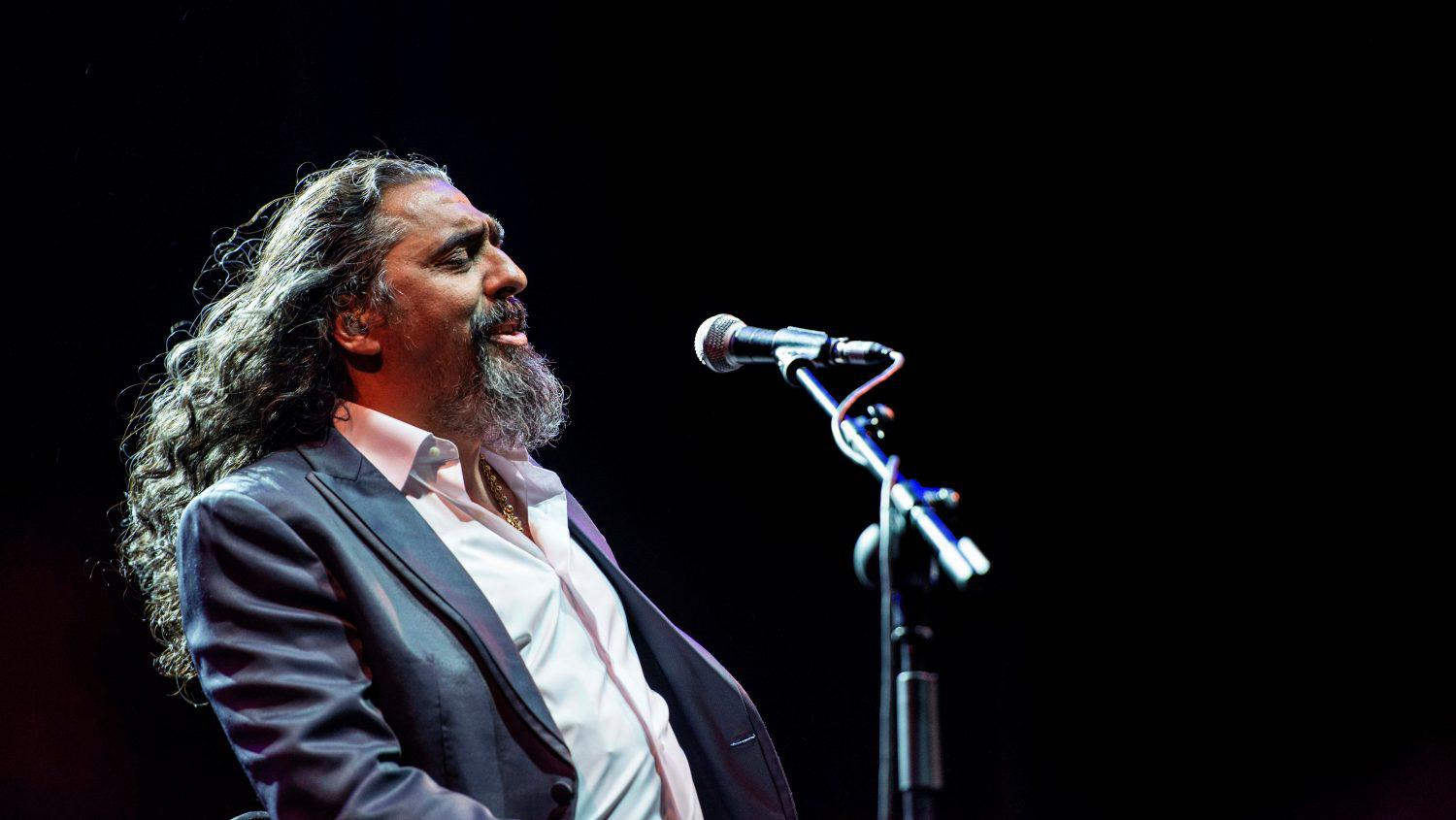 Las fiestas de San Isidro se despidieron ayer de Madrid hasta el año que viene con una jornada en la que los madrileños y madrileñas pudieron disfrutar de 43 actividades y conciertos repartidos por toda la ciudad y para todos los gustos y edades.